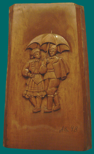 Sestincani.